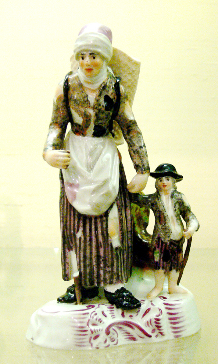 Bettelweib mit Kind, Limbach/Thüringen, um 1785, Porzellan, Muffel-Technik Gallery: Reiss-Engelhorn-Museen, Mannheim